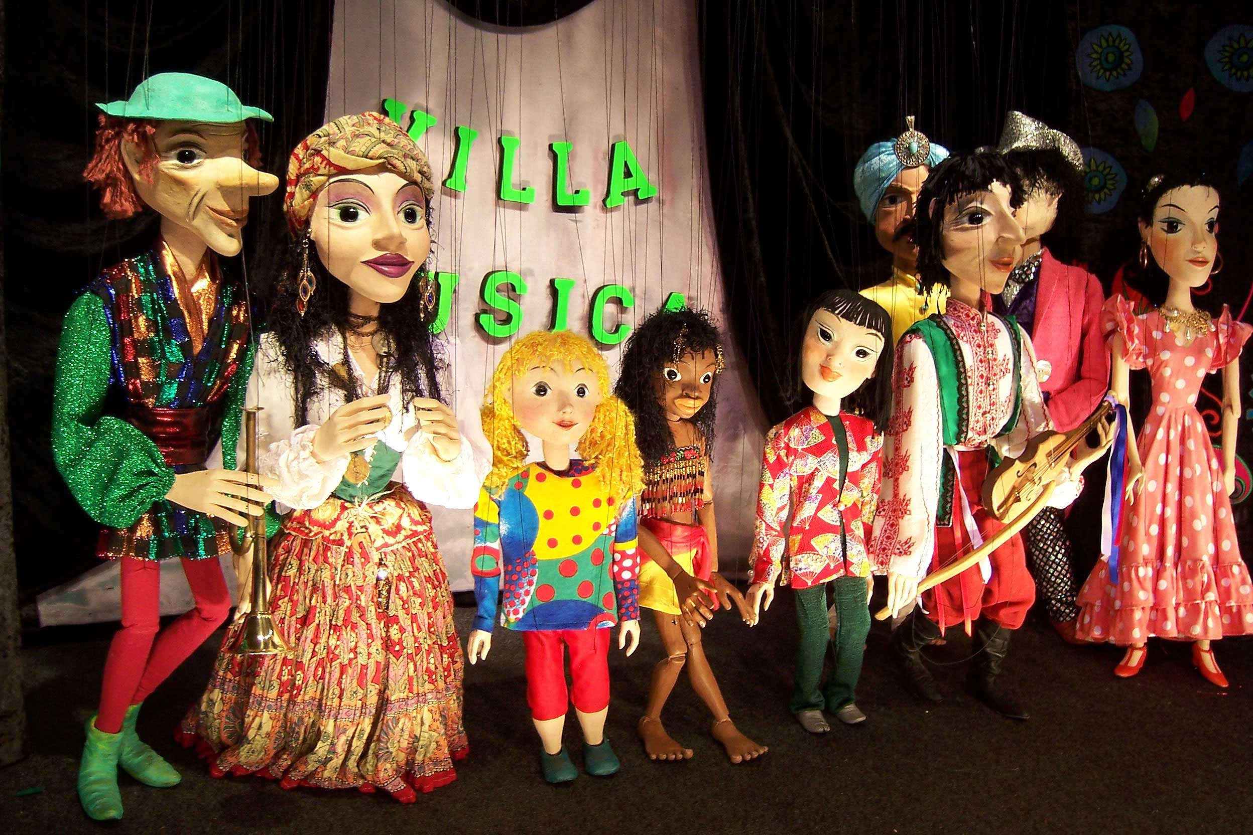 Marionetten Theater Plön, Schleswig-Holstein